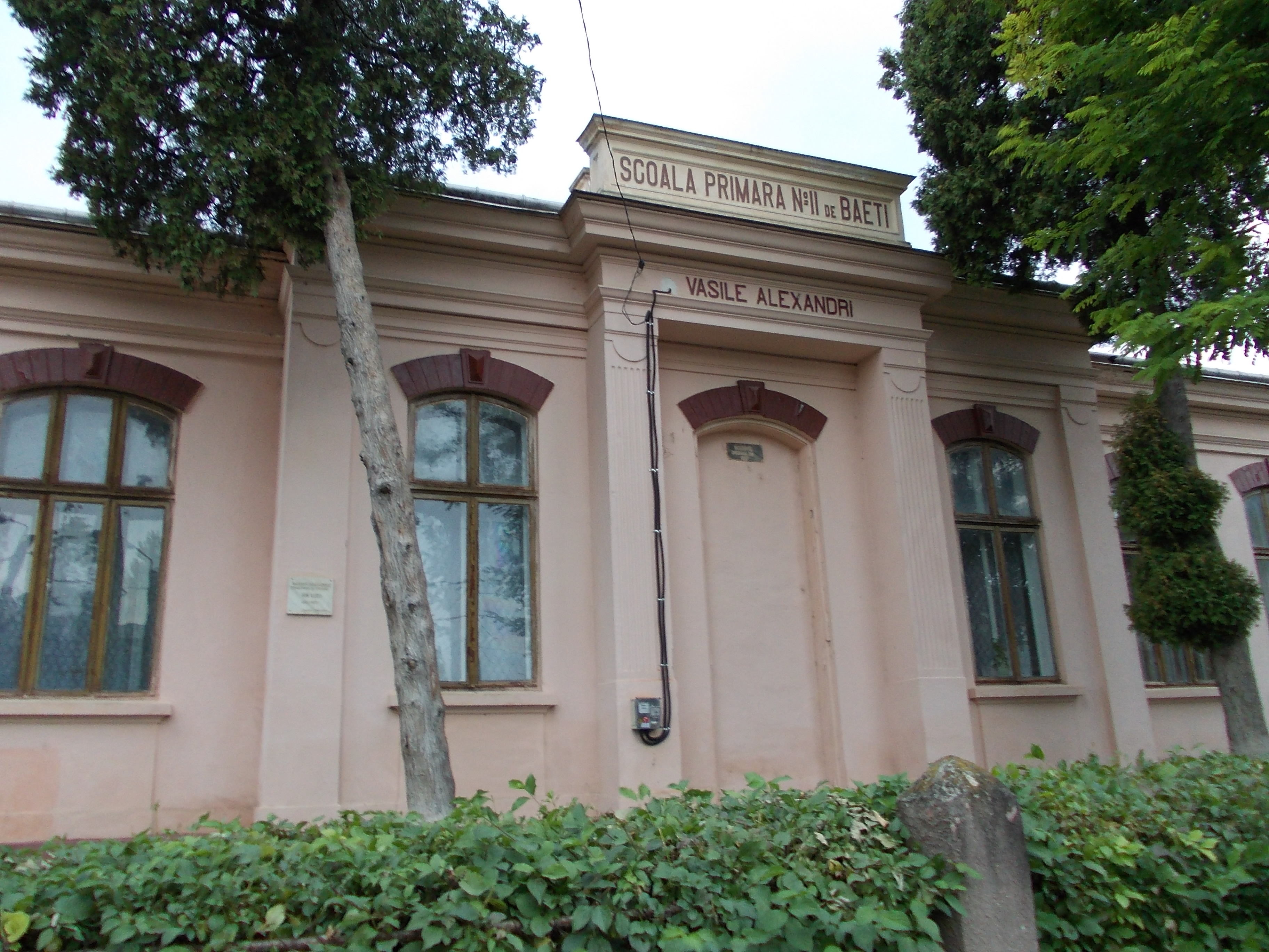 Școala nr. 1 "Vasile Alecsandri"